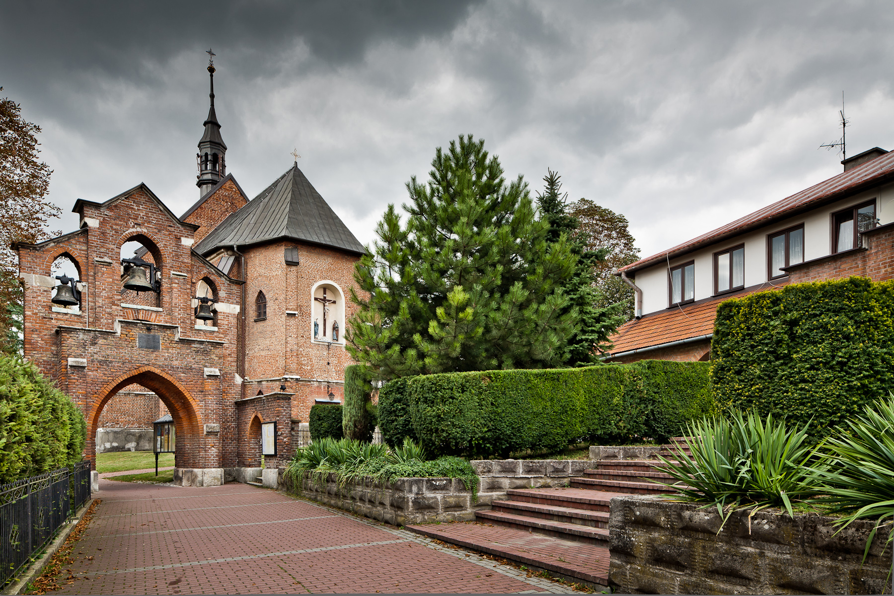 Kościół par. p.w. Znalezienia i Podwyższenia Krzyża Św., Luborzyca - widok ogólny